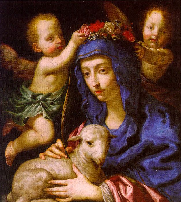 Santa Inéslabel QS:Les,"Santa Inés"